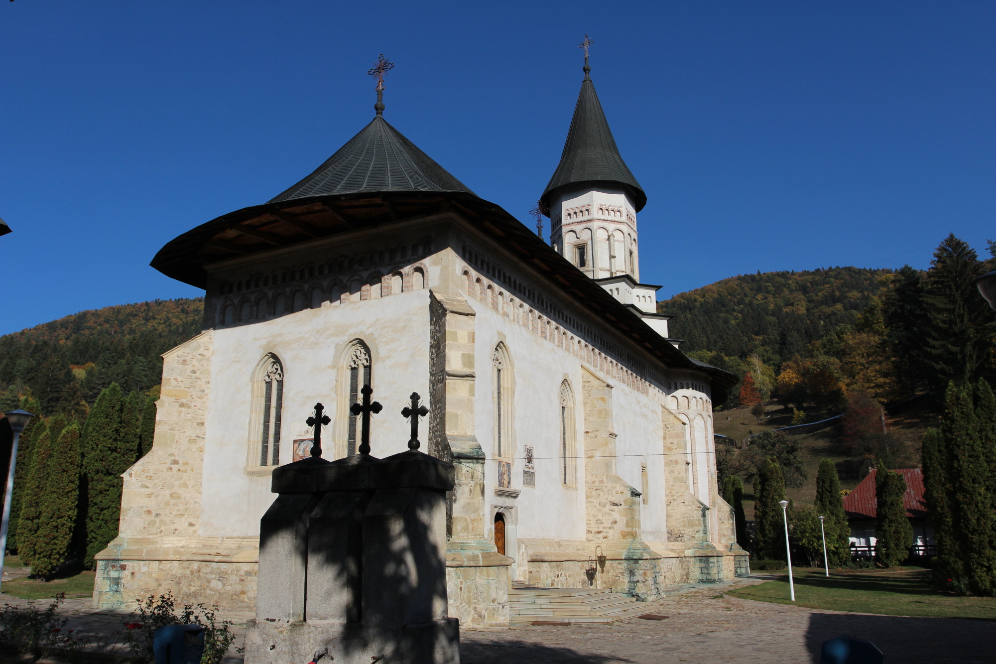 Biserica "Adormirea Maicii Domnului" ("Înălțarea Domnului" și "Sf. Ana") 01